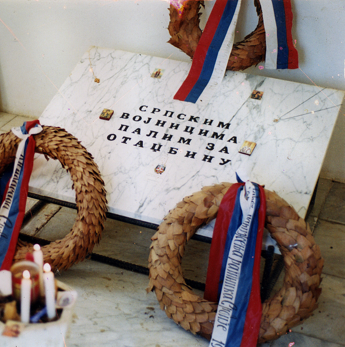 Спомен-плоча српским војницима у капели на гробљу у Бизерти, Тунис.